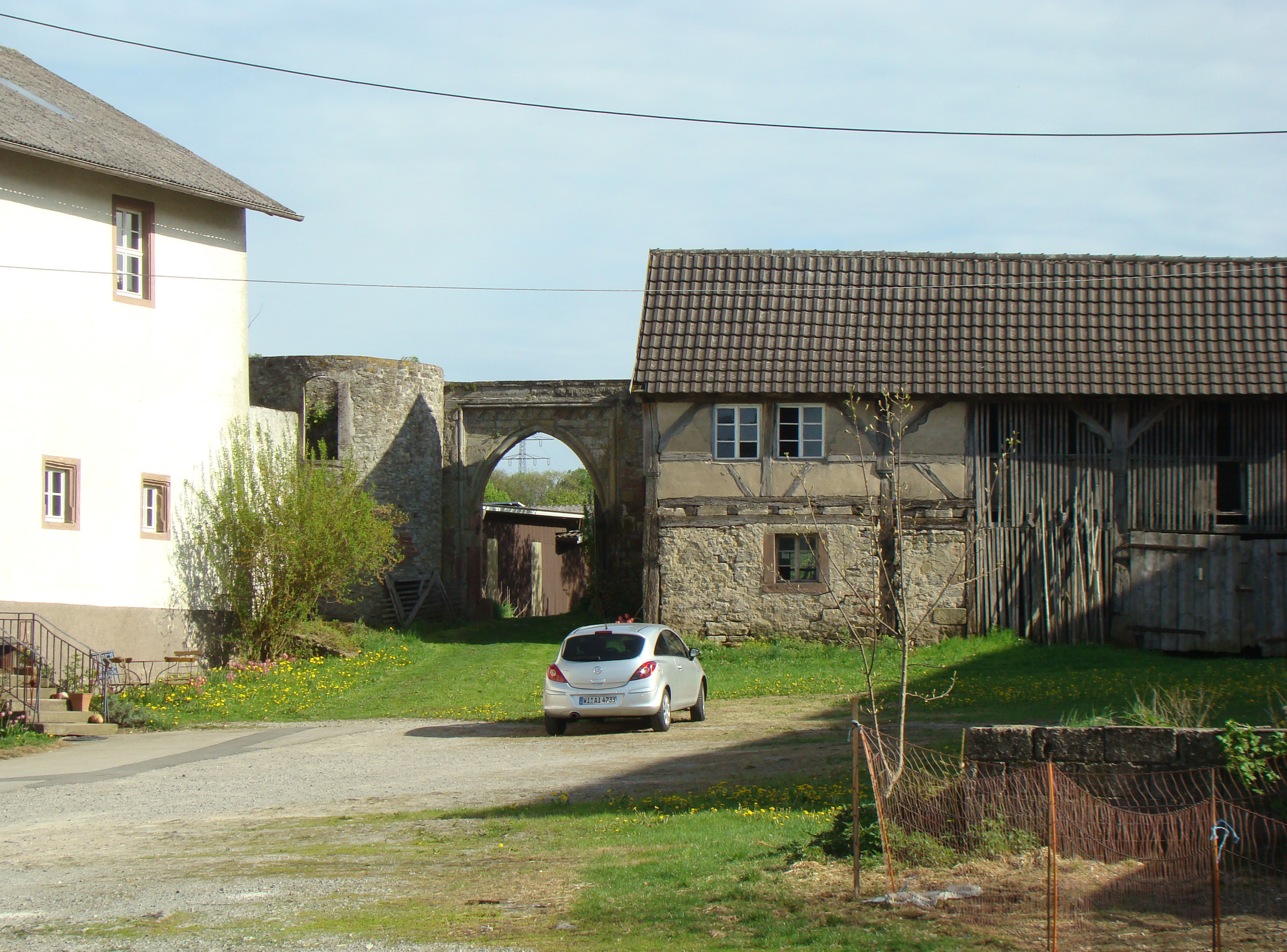 Ehem. Kloster Seligental bei Osterburken-Schlierstadt